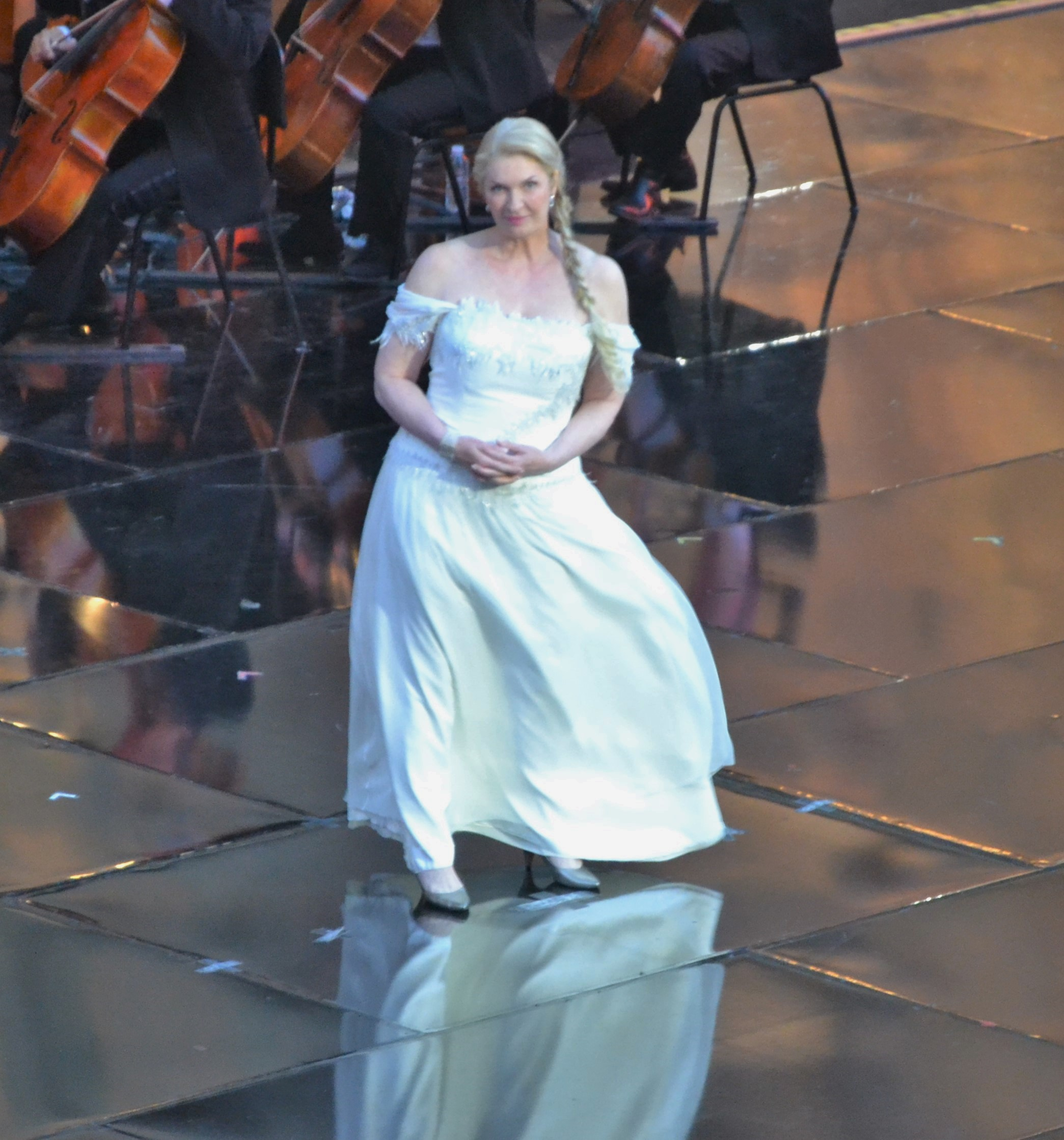 Annick Massis lors de l'émission Musique en fête 2015 à Orange